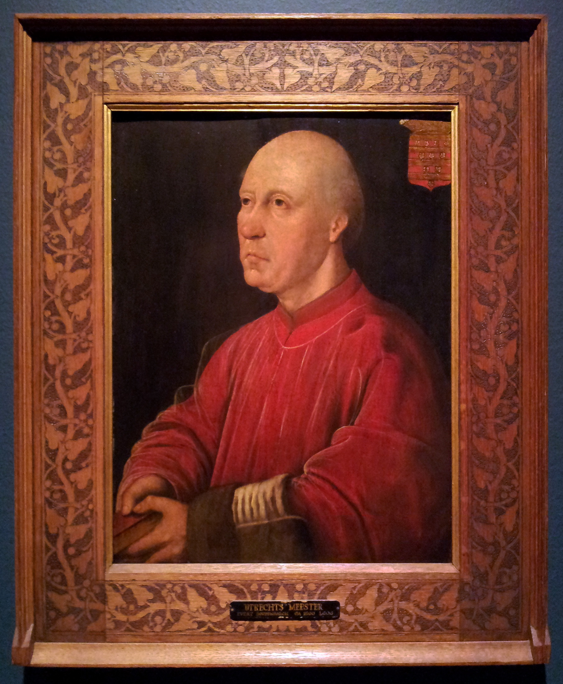 Portret van Evert Zoudenbalch (ca. 1425-1503), proost van het kapittel van Sint Servaas te Maastricht, kanunnik, vice-deken en thesaurier van het kapittel van de Dom te Utrecht, stichter van het Sint Elisabethsgasthuis te Utrecht.